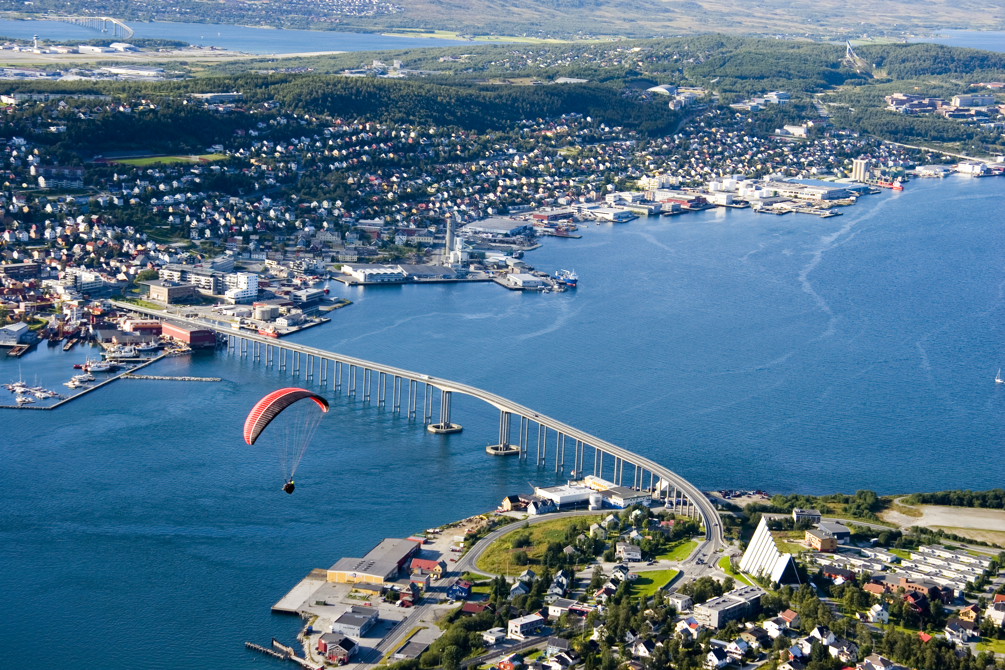 Aussicht vom Storsteinen / Tromsø